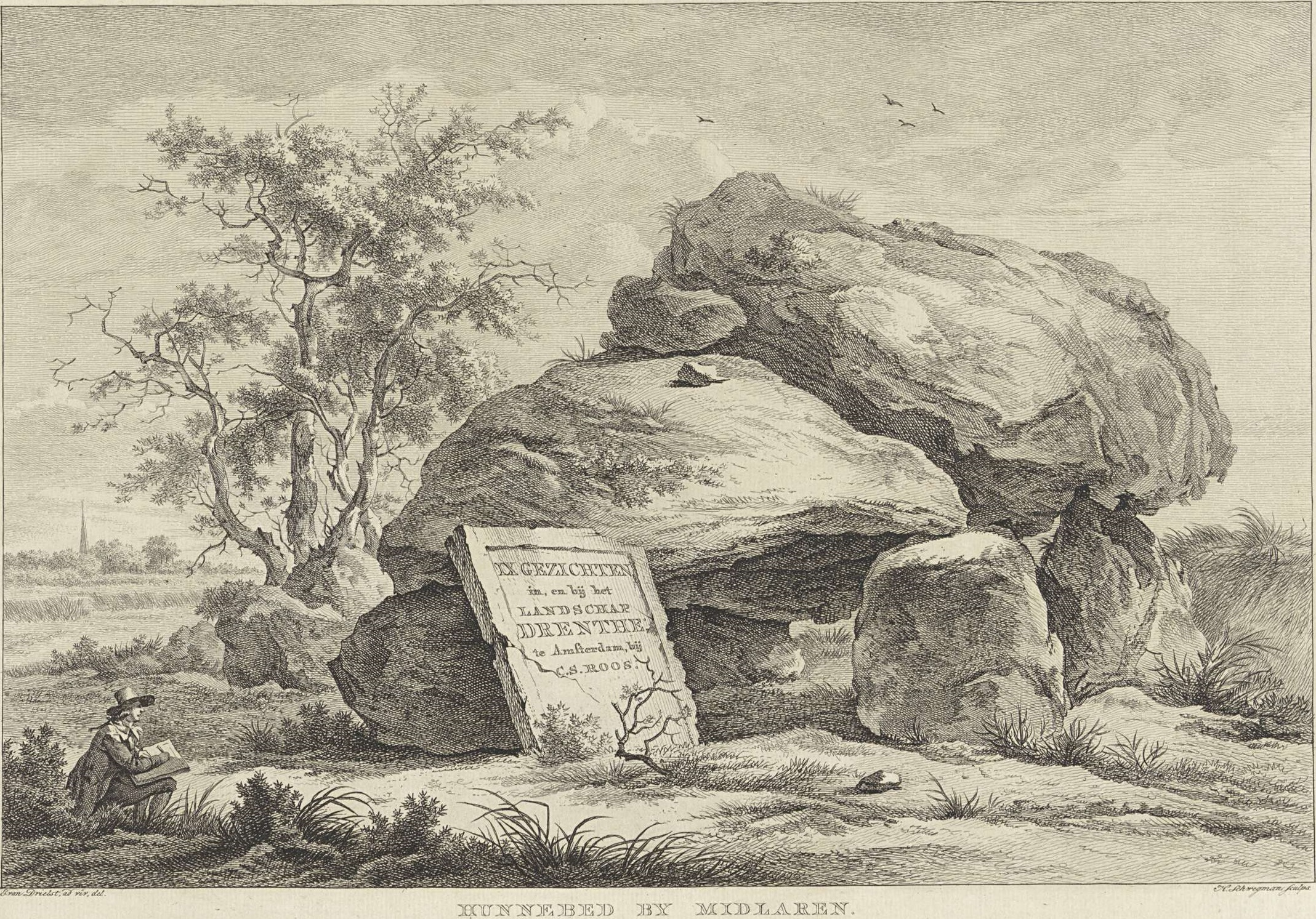 Het hunebed bij Noordlaren. Kopergravure van Hendrik Schwegman (1761-1816) en Egbert van Drielst (1745-1818). Foutief 'Hunnebed by Midlaren' genoemd. De gravure is sterk verfraaid ten opzichte van de werkelijkheid.